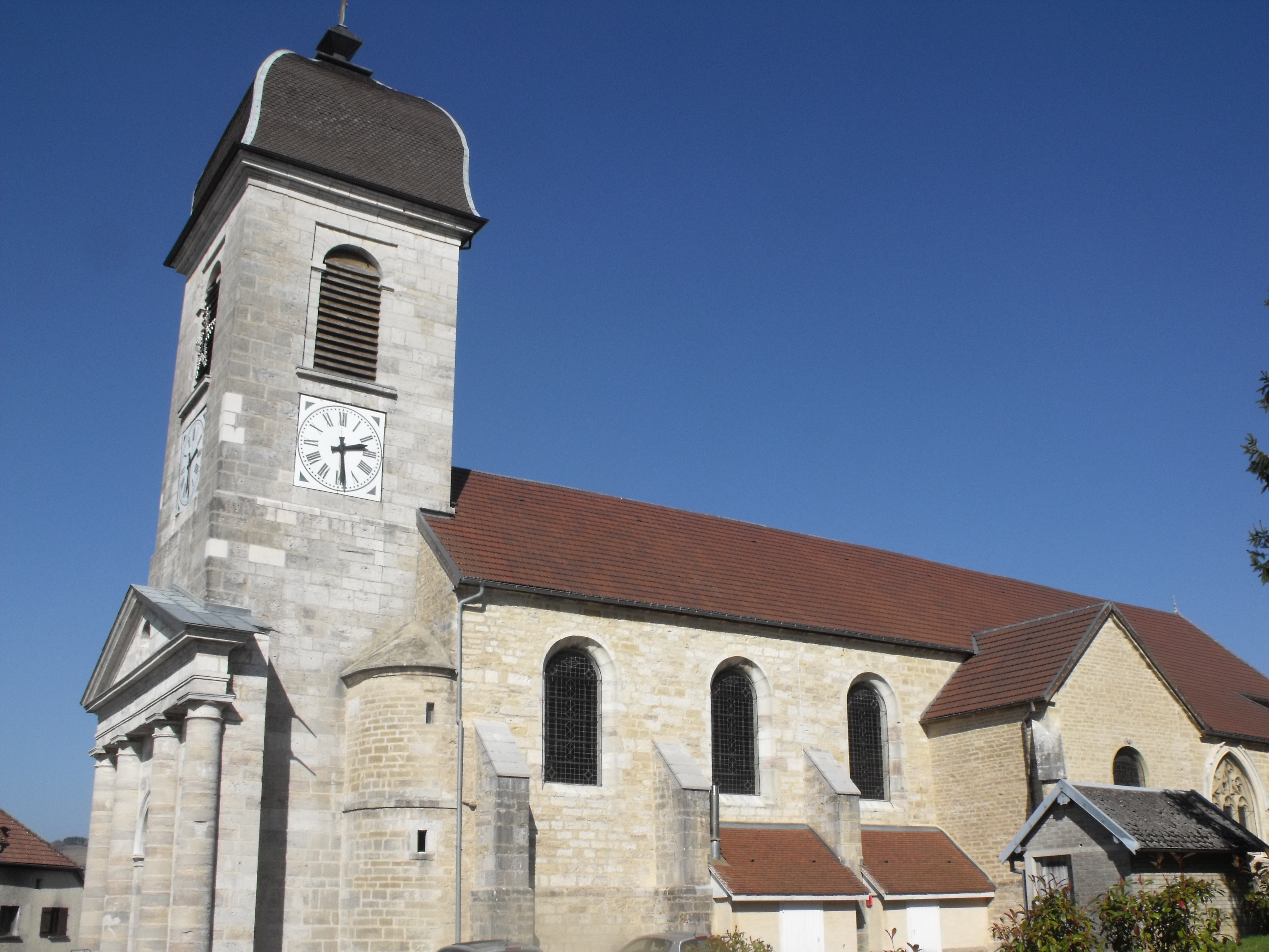 Église Saint-Martin de Sancey-l'Église, Sancey-le-Grand, Doubs, France